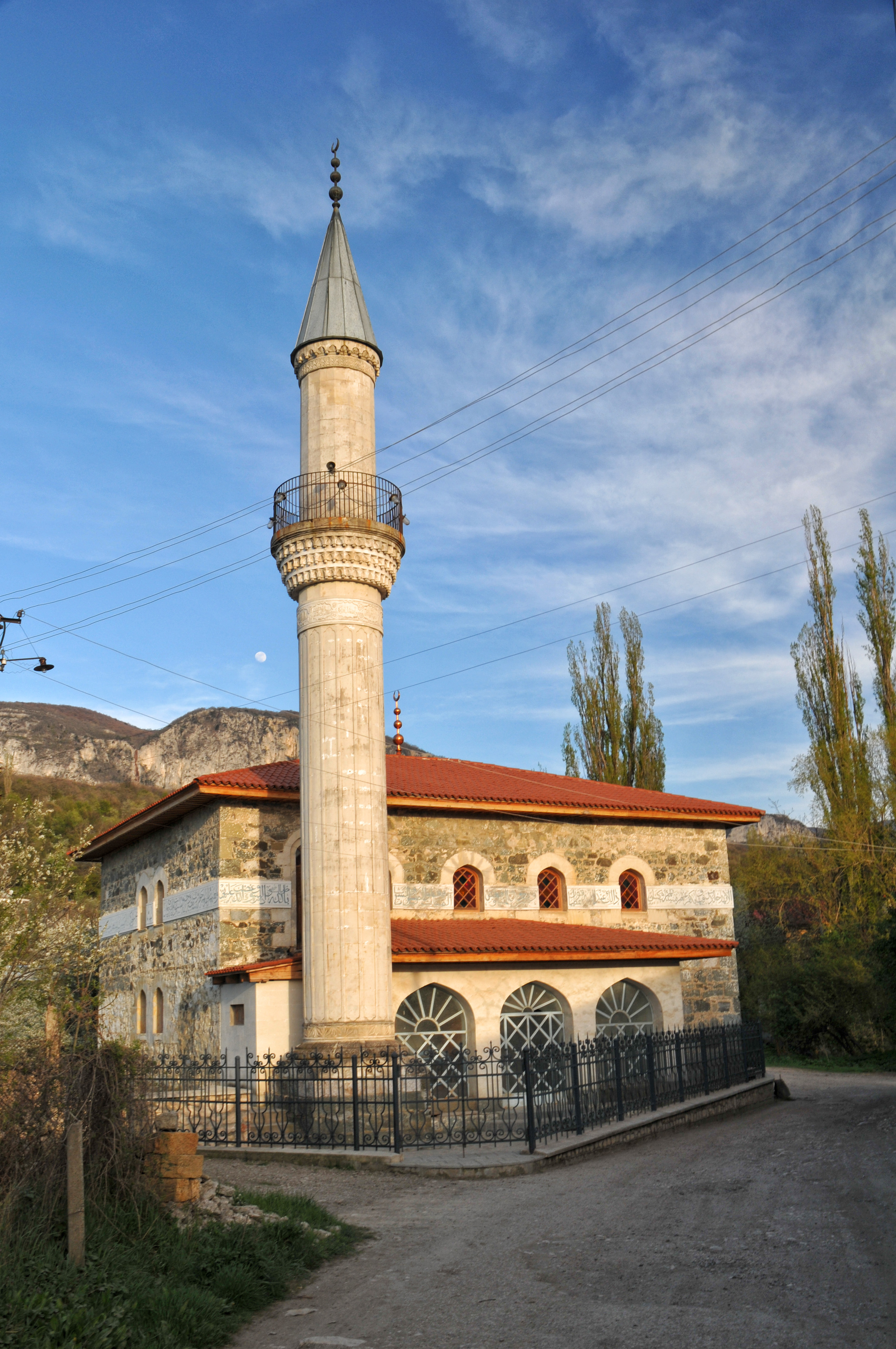 Мечеть в Соколиному